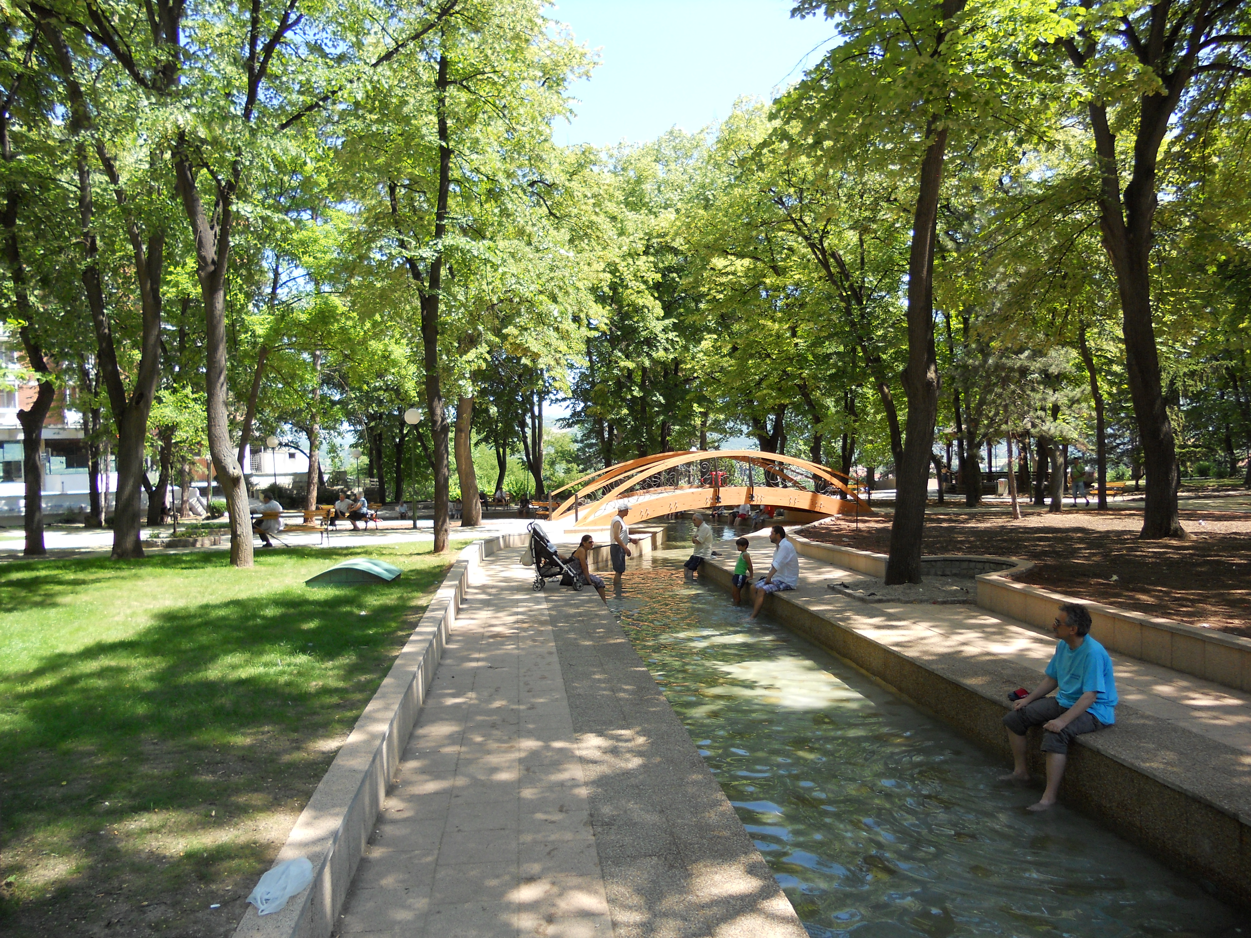 Niška Banja, od česme „Tri kralja“ do stacionara „Radon“, pruža se vodeno korito banjske tople vode, koja proatiče kroz lepo uređen park. Autor: dr Milorad Dimić, Niš, Srbija. 17. jun 2012.